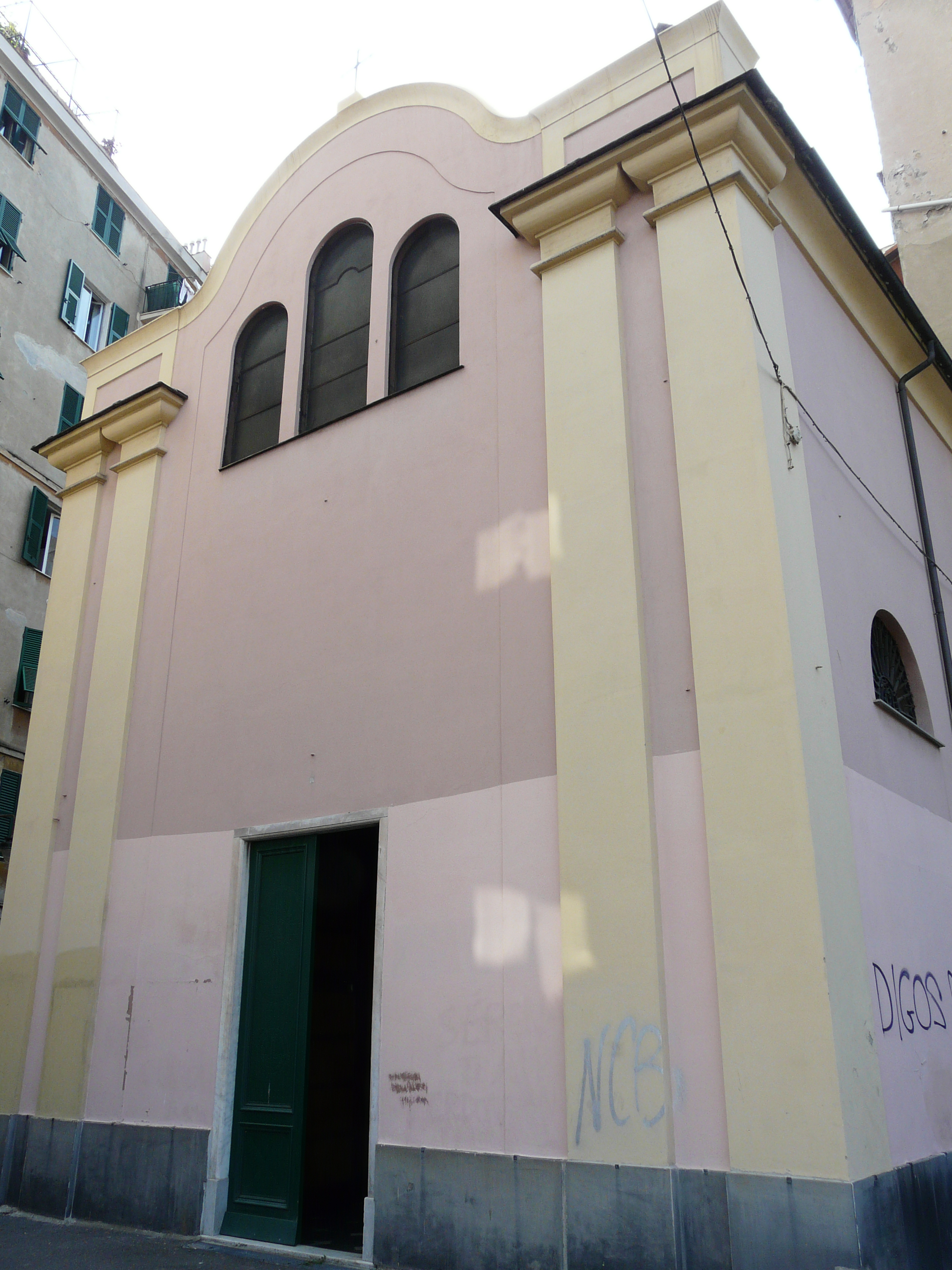 Santuario di Nostra Signora delle Grazie, Genova, Liguria, Italia